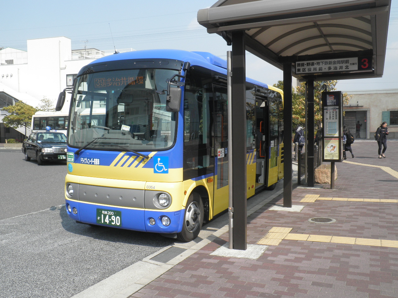 北野田駅前で発車を待つ多治井循環